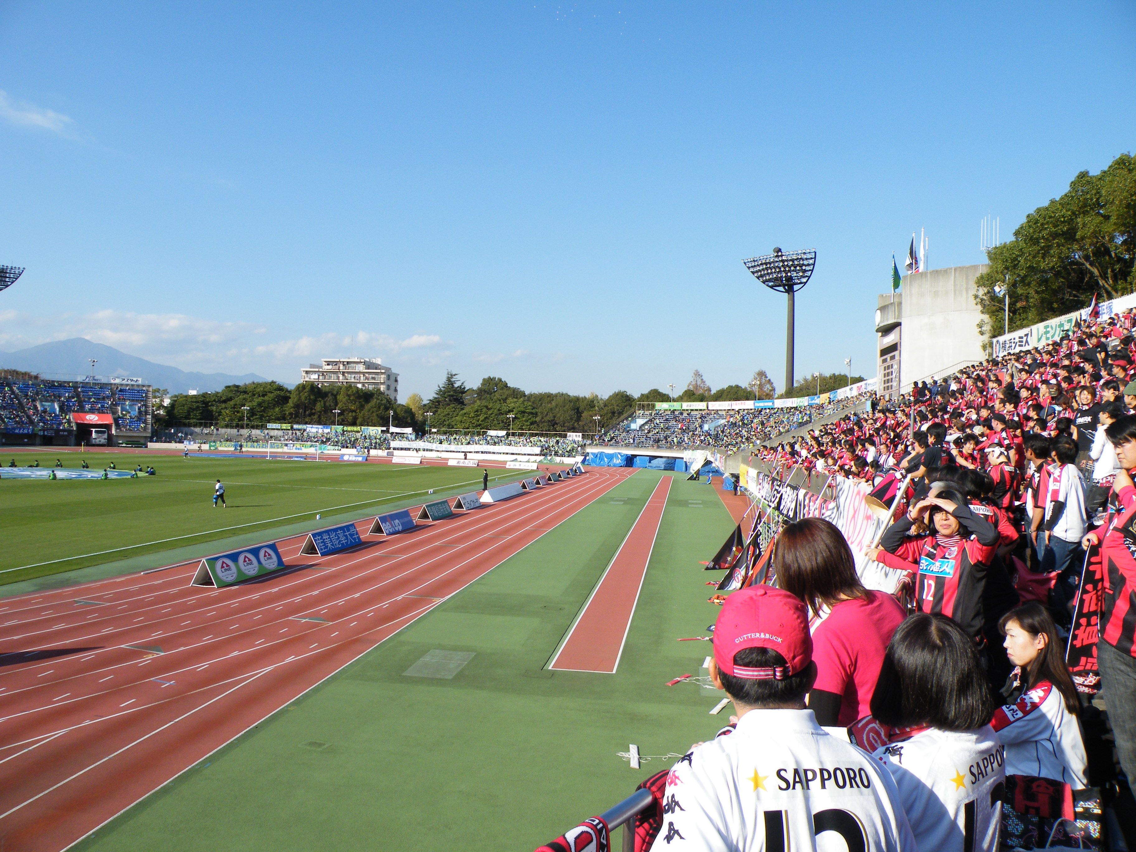 Jリーグディヴィジョン2第37節 湘南対札幌（平塚競技場）